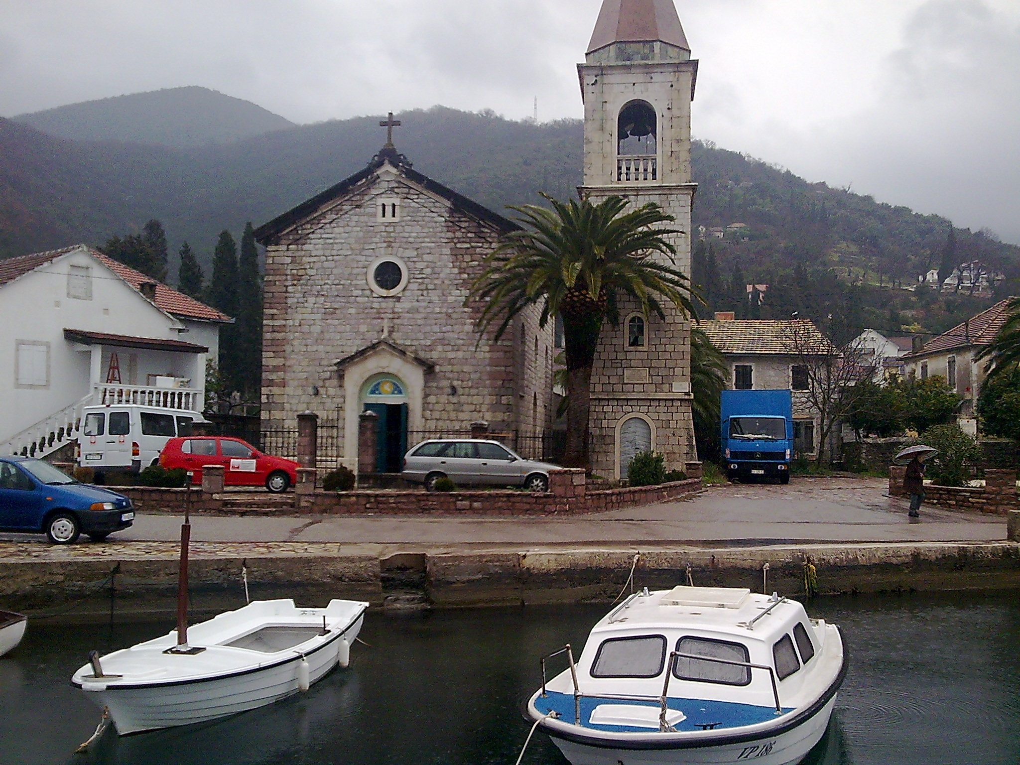 Donja Lastva Obala, Donja Lastva, Montenegro